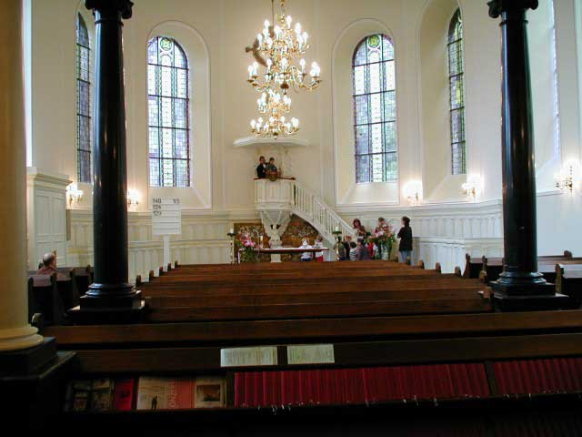 Finkenbergkirche_von_innen_(Stolberg,_Rhld.)